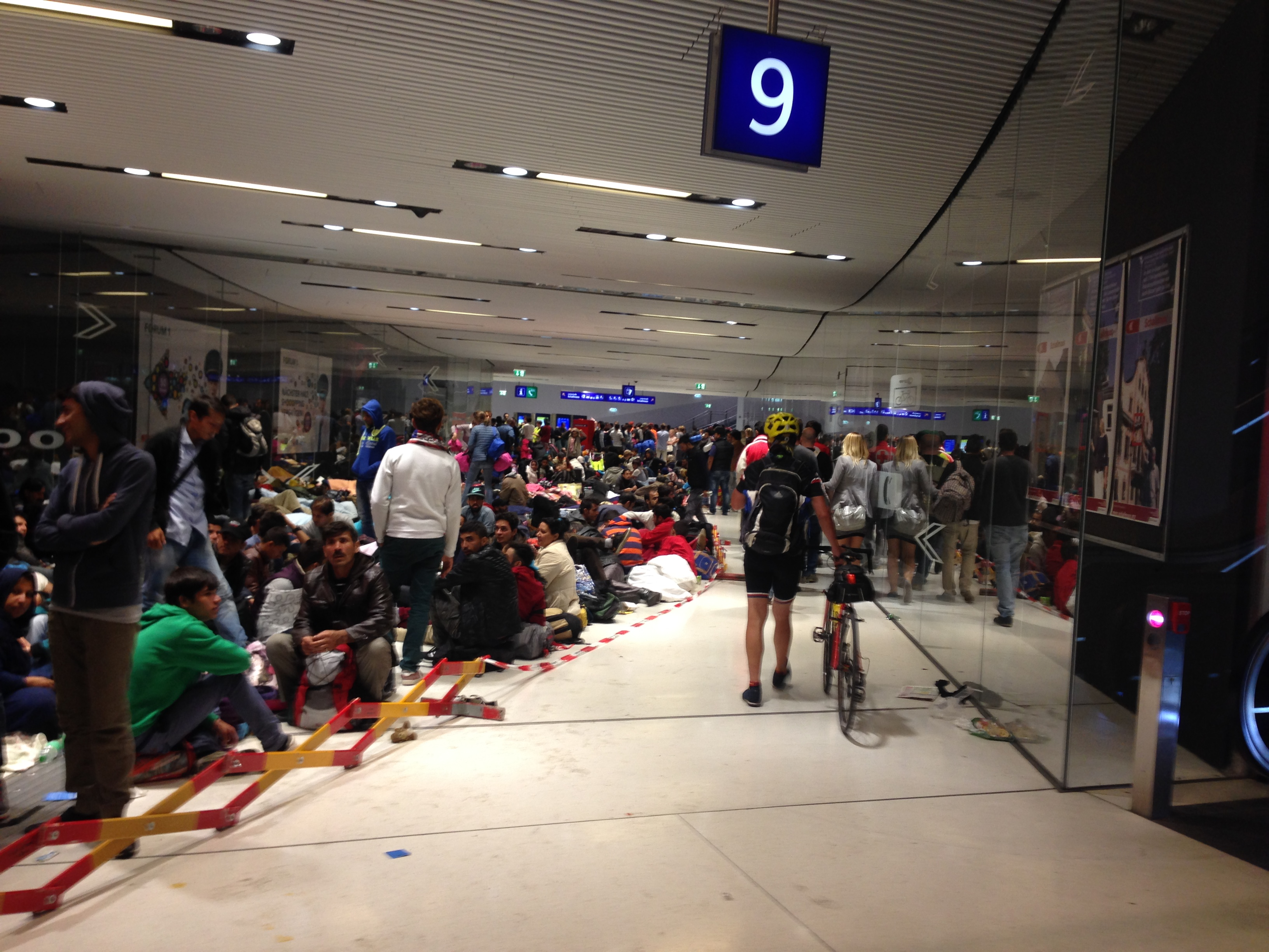 Notversorgung von Flüchtlingen am Salzburg Hauptbahnhof